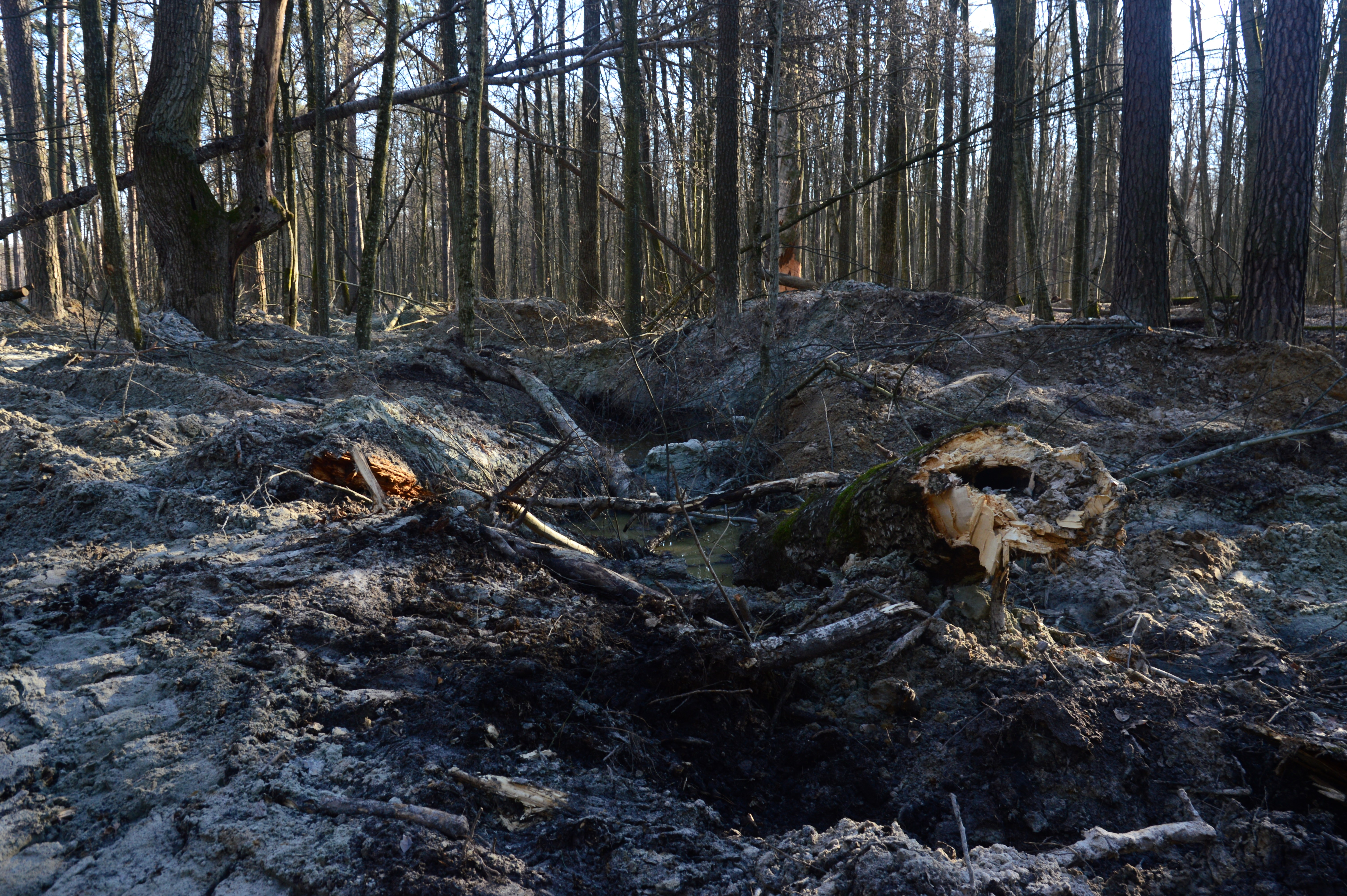 Поясківський, Олевський р-н Житомирської області. Одна з найстаріших лісових ділянок Українського Полісся.